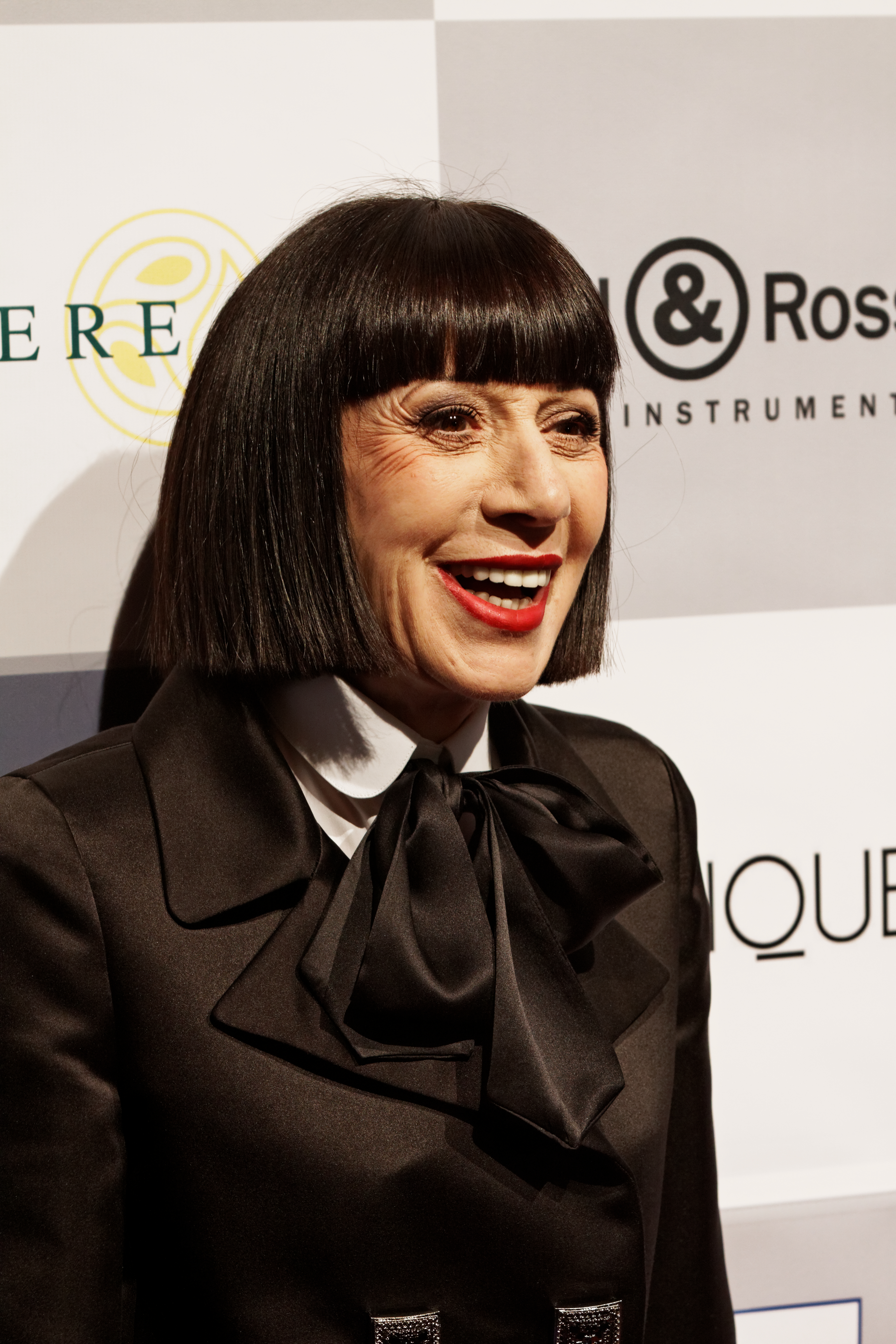 Chantal Thomass posant lors du photocall du festival automobile 2013.